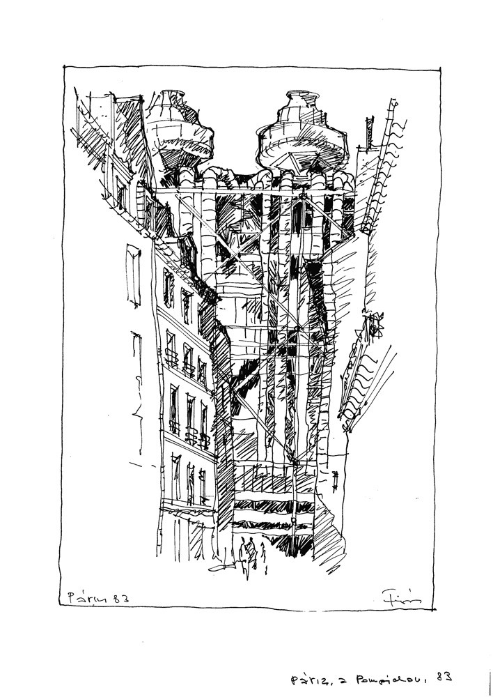 Pompidou központ, Párizs. Franciaország (útirajz)